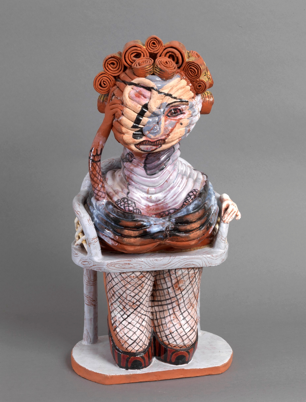 Sculpture: La belle bouclée